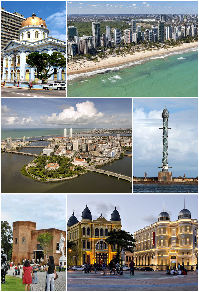 Do topo, em sentido horário: Assembleia Legislativa de Pernambuco na Rua da Aurora; vista aérea do bairro do Pina; "Torre de Cristal" no Parque das Esculturas Francisco Brennand; Marco Zero; entrada do Instituto Ricardo Brennand; e Ilha de Antônio Vaz e pontes do Centro do Recife.